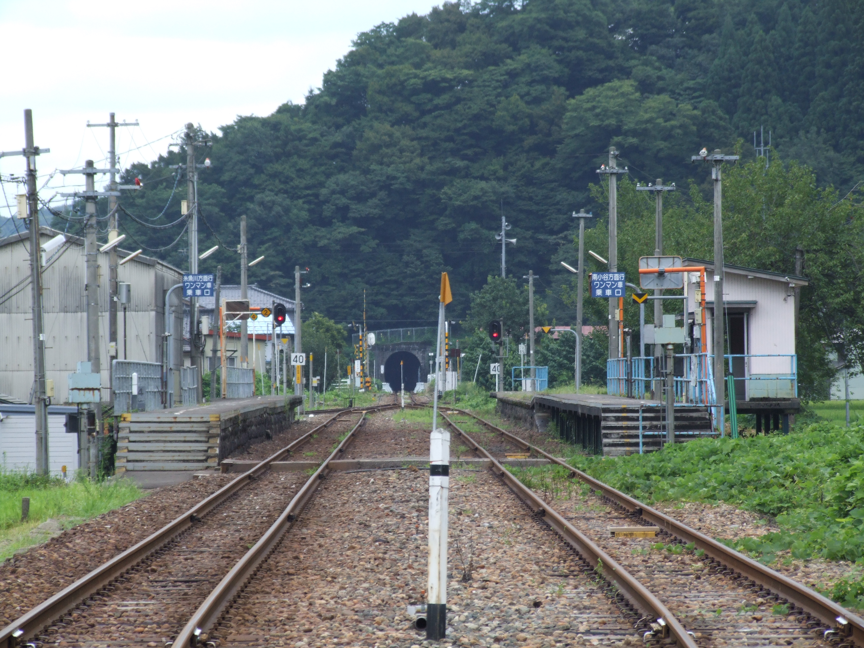 根知駅構内（安全を確認して踏切から撮影）